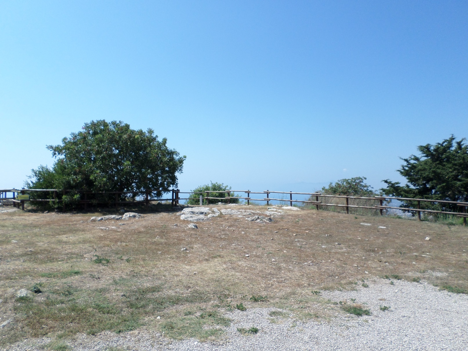 Tempio di Giove Anxur This is a photo of a monument which is part of cultural heritage of Italy.